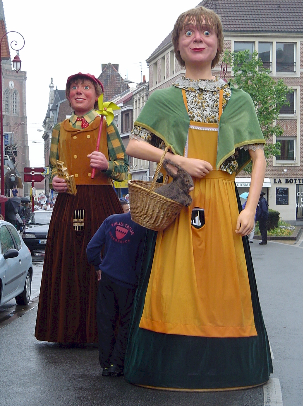 Hazebrouck giants Babe Tisje and Zooon Tisje